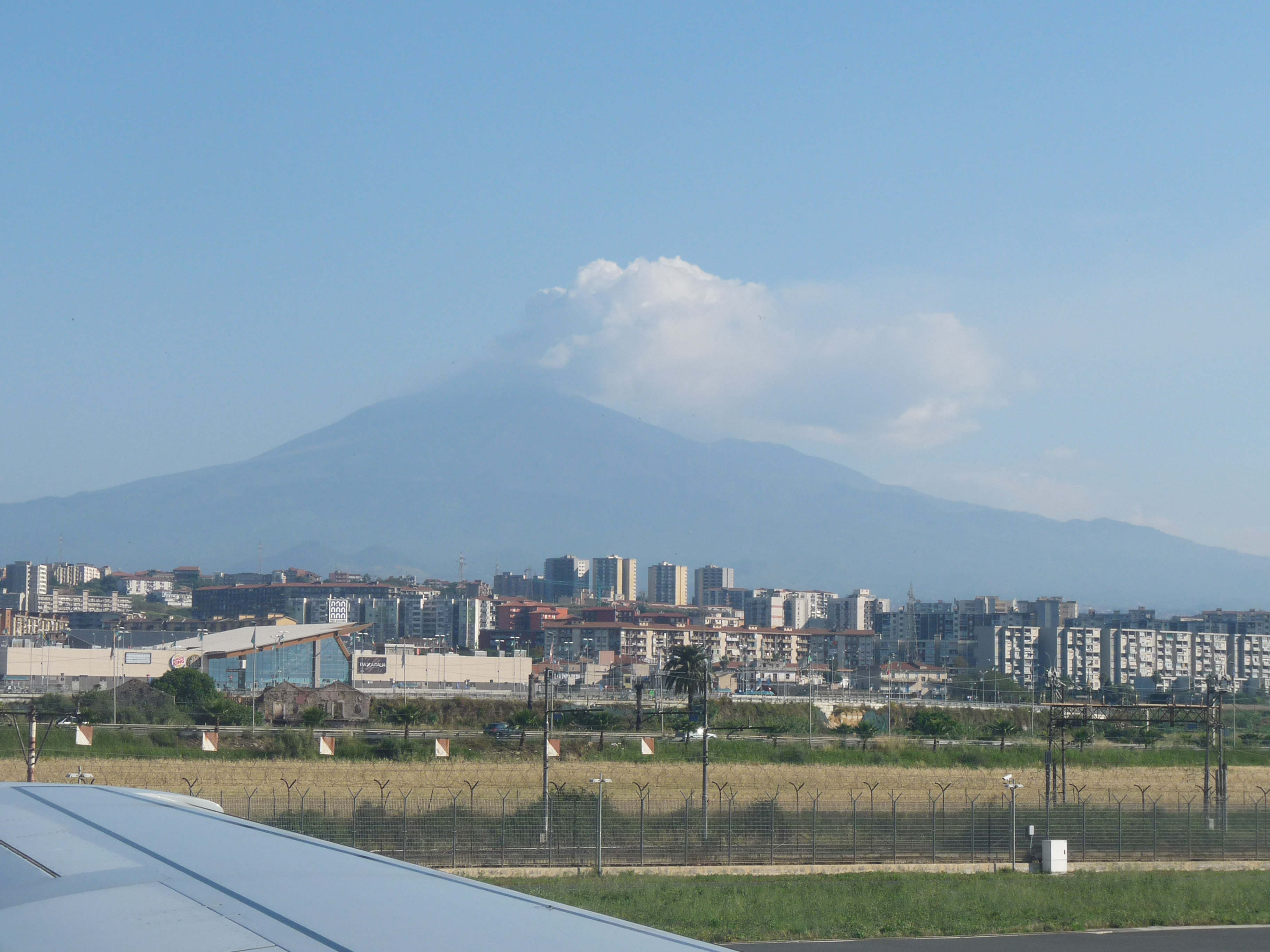 Tagalog: L'Etna vu depuis l'aéroport de Catane (Sicile)